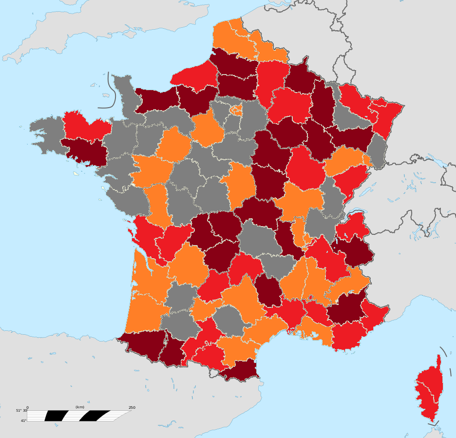 Pourcentage de "gilets jaunes" rapporté à la population. Selon une carte réalisée par le géographe Hervé Le Bras. de 1,8% à 6,8% de 1% à 1,8% de 0,3% à 1% de 0,04% à 0,3% Pour élaborer cette carte, le géographe Hervé Le Bras a "rapporté à la population la fourchette moyenne des chiffres de participation du 17 novembre fournis par les préfectures".